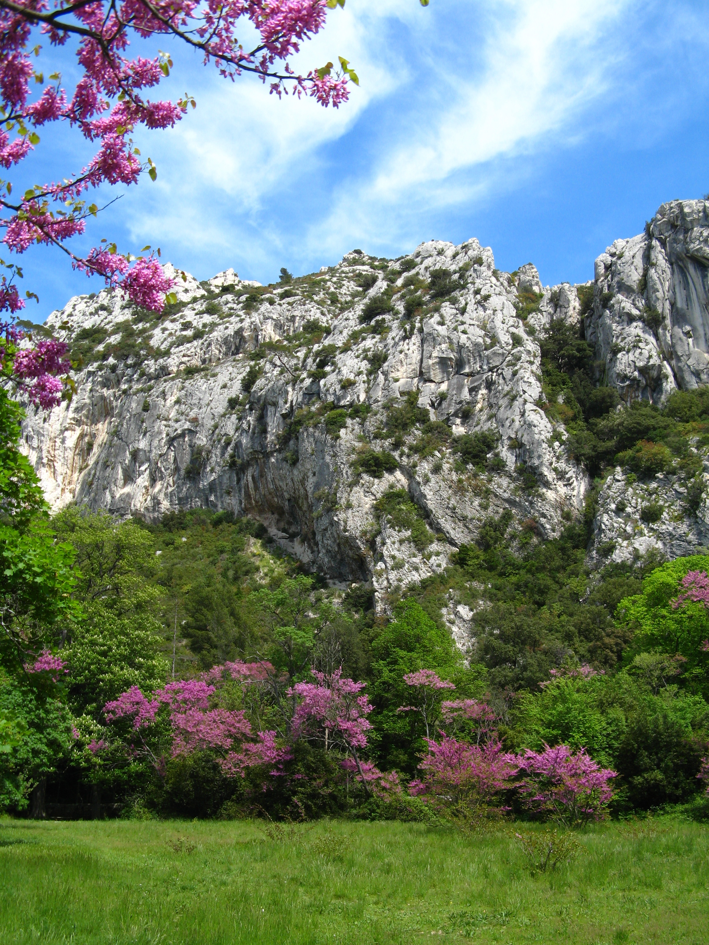 Parc départemental de Saint-Pons (Gémenos, Bouches-du-Rhône)